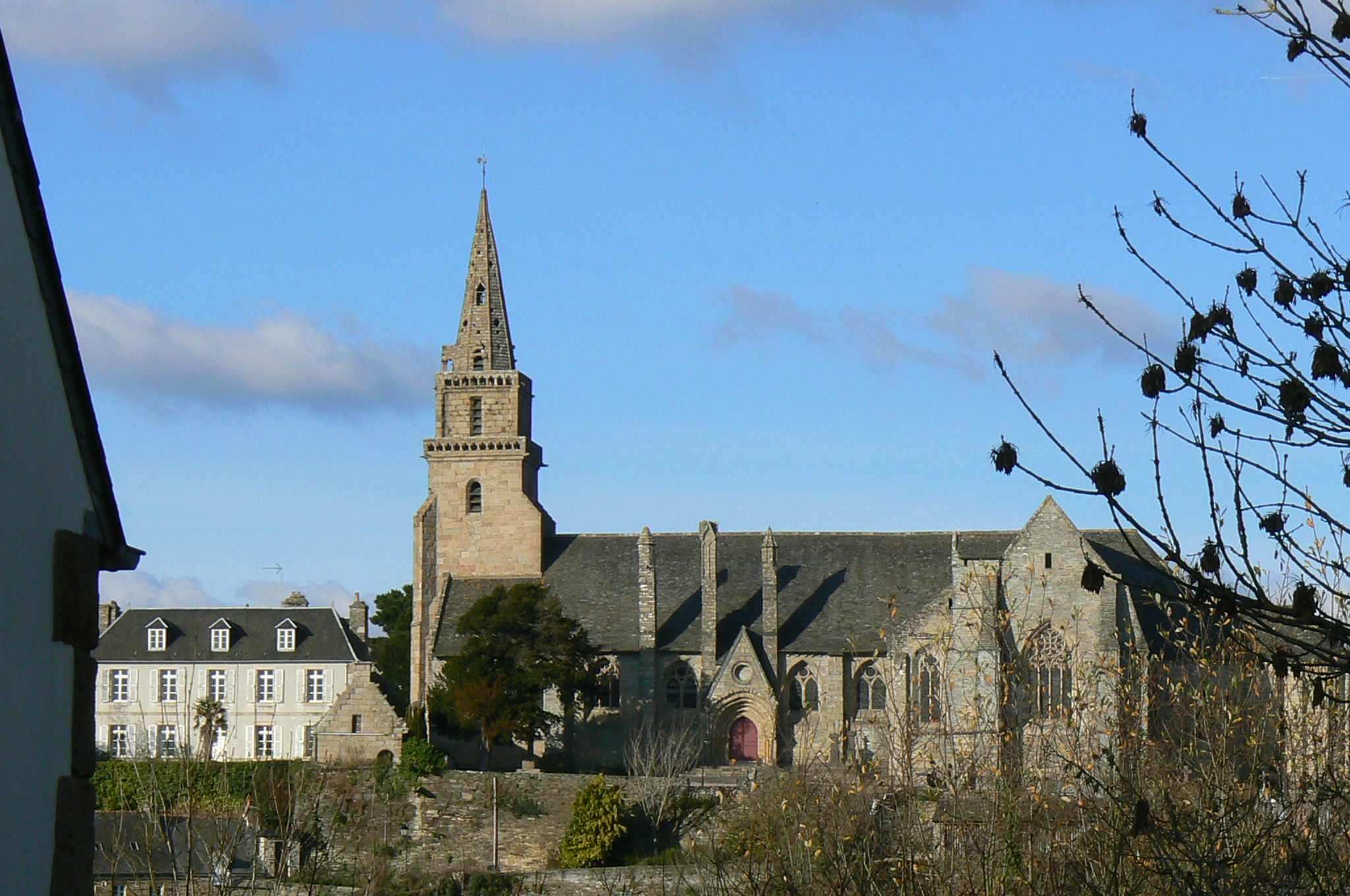 église gothique, avec quelques parties romanes, jouxtant son cimetière, elle domine la ville et on peut y accèder par un escalier .